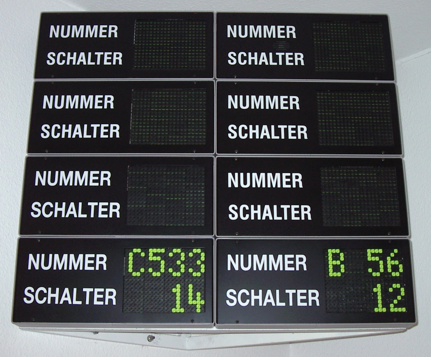 Anzeige einer Aufrufanlage einer Behörde